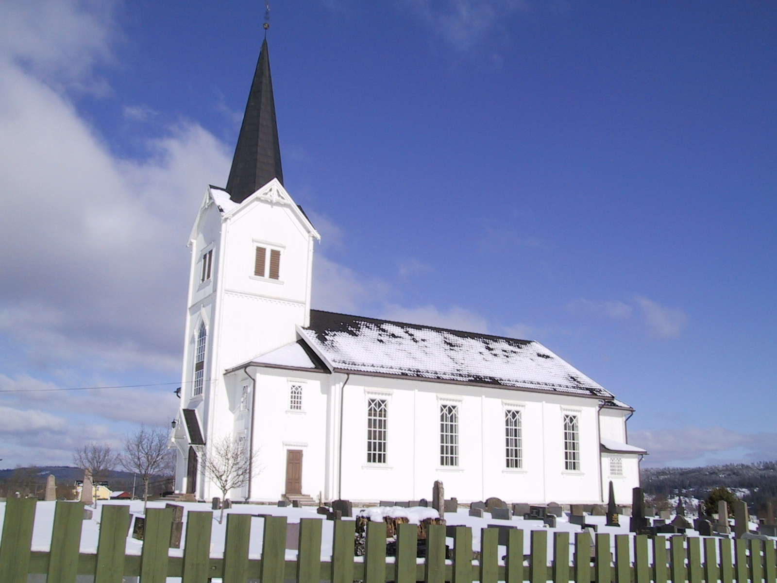 Vestmarka kirke